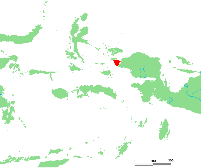 ID Salawati.PNG